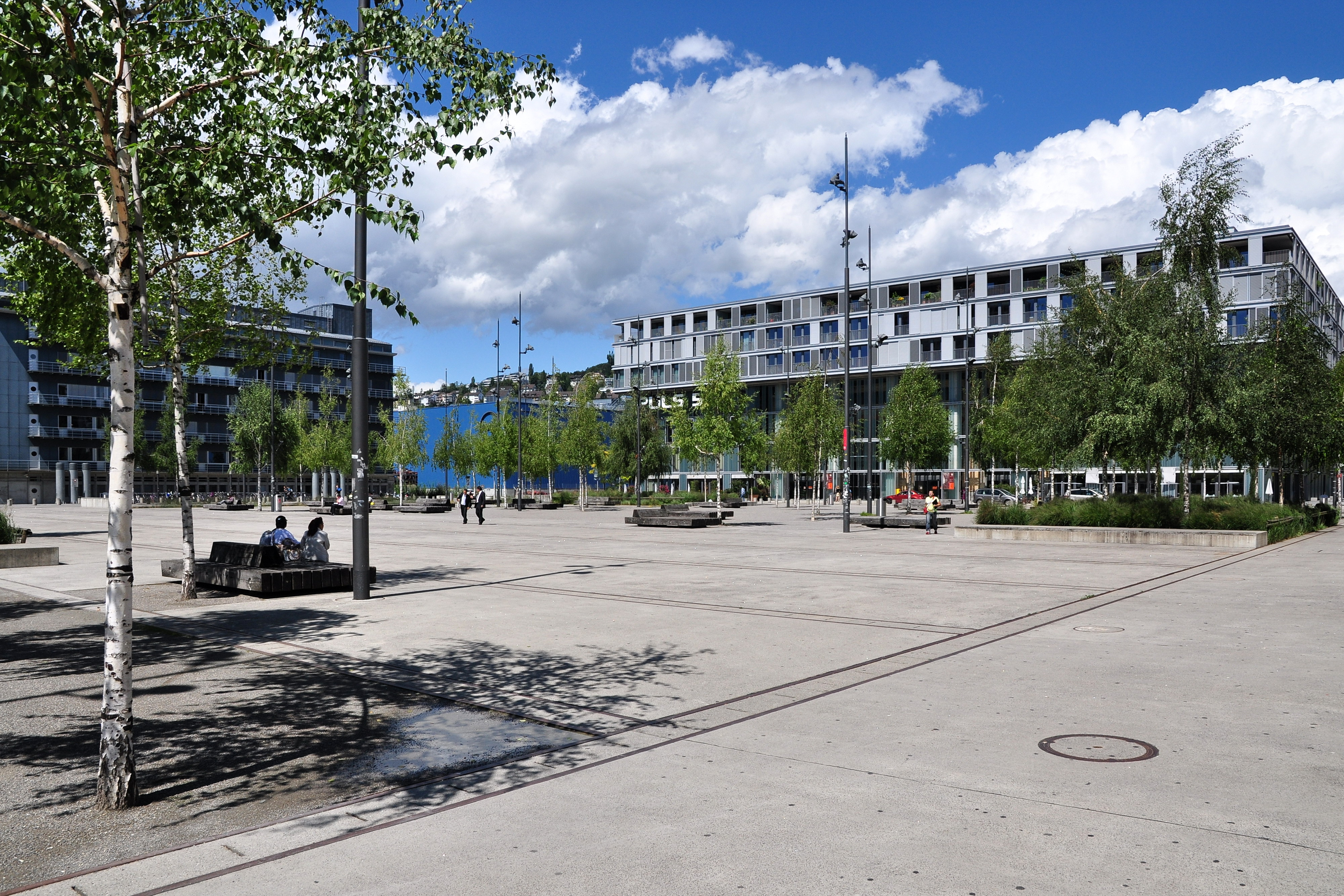 Turbinenplatz in Zürich-Industriequartier (Switzerland)